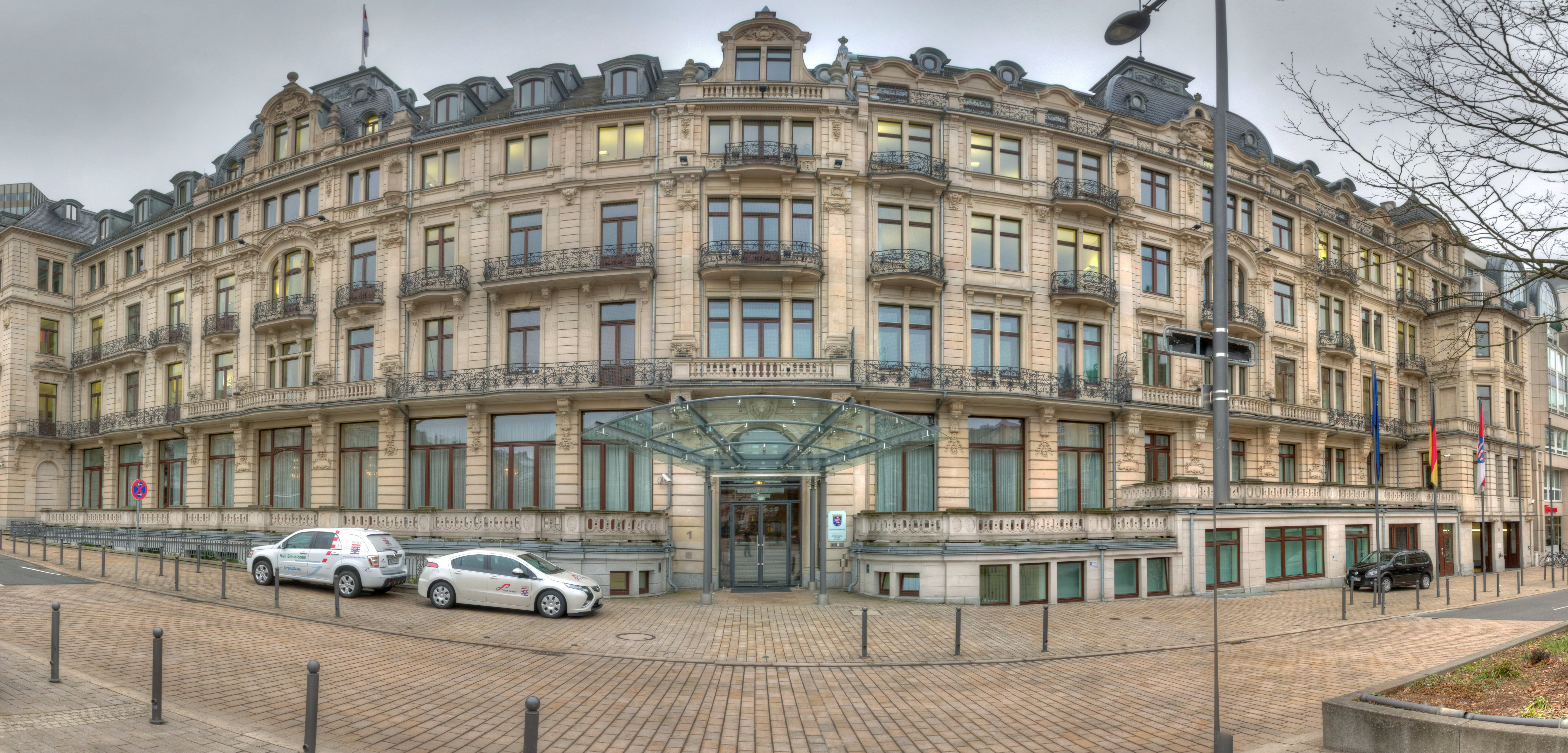 Landtagsprojekt Hessen – Hessische Staatskanzlei, Fassade der hessischen Staatskanzlei im ehemaligen Hotel Rose am Kranzplatz in Wiesbaden